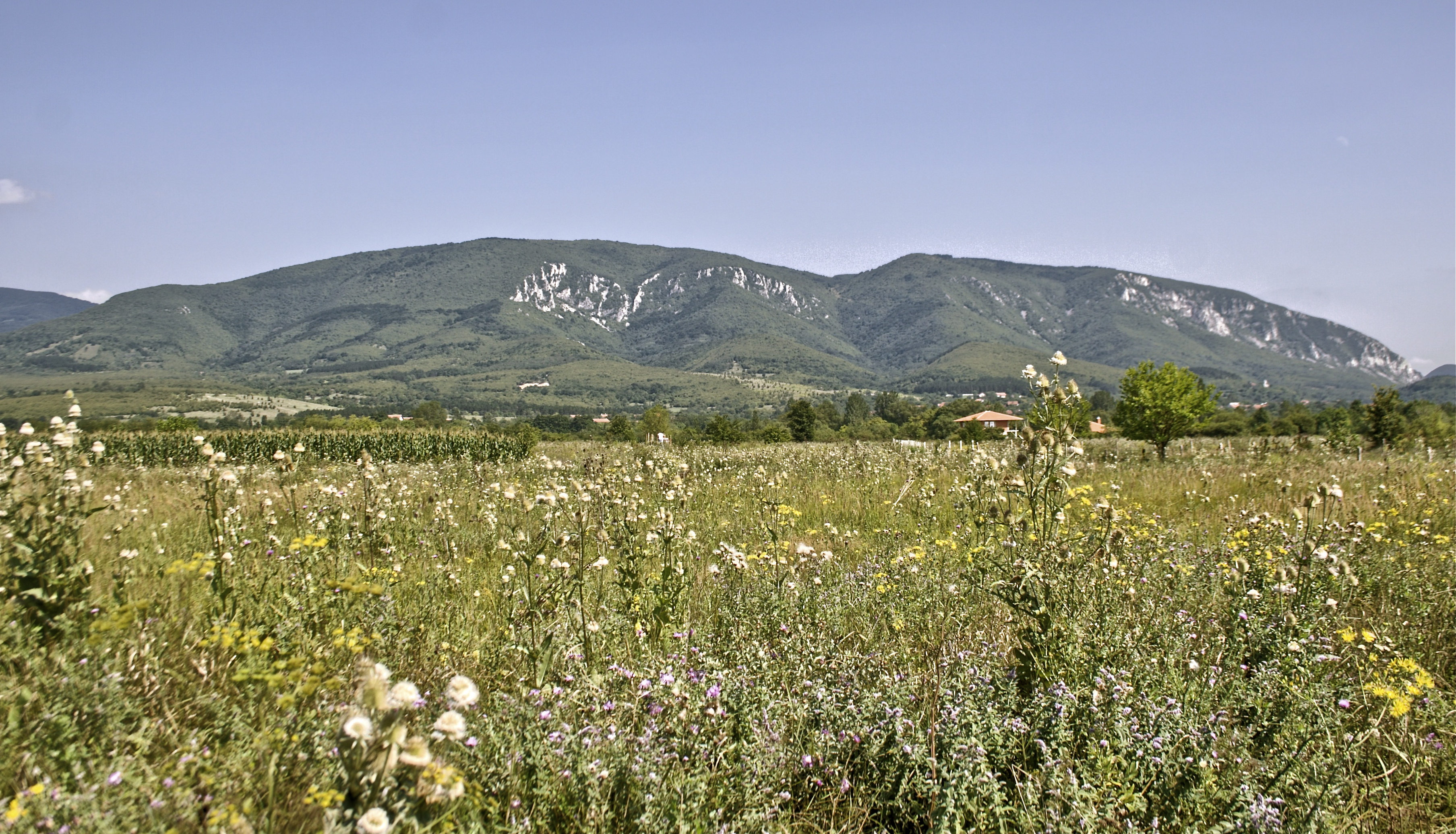 Хомољске планине - Велики Вукан сликано са Регионалног пута 105 код Бање Ждрело